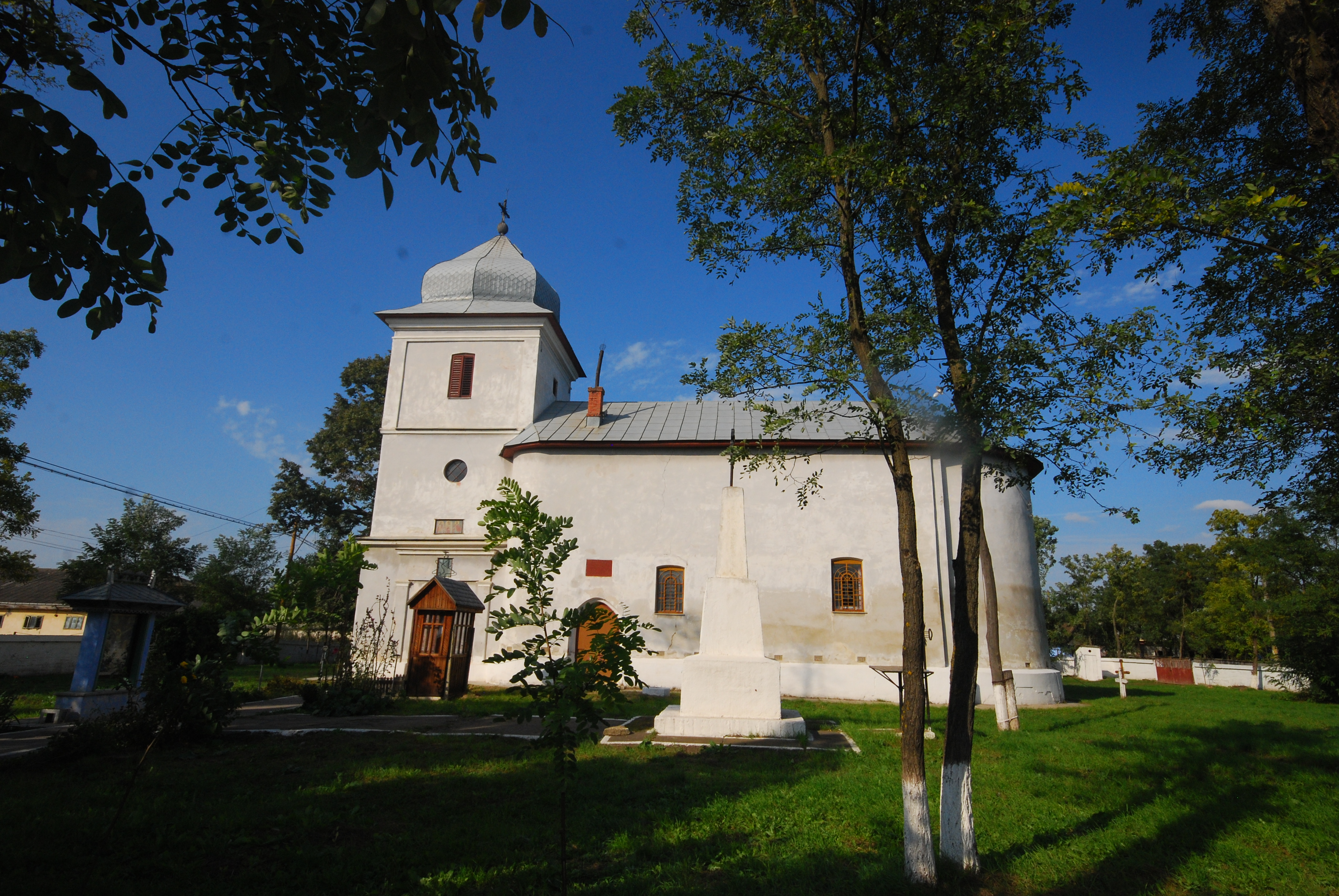 Biserica "Sf. Ioan cel Nou" 01